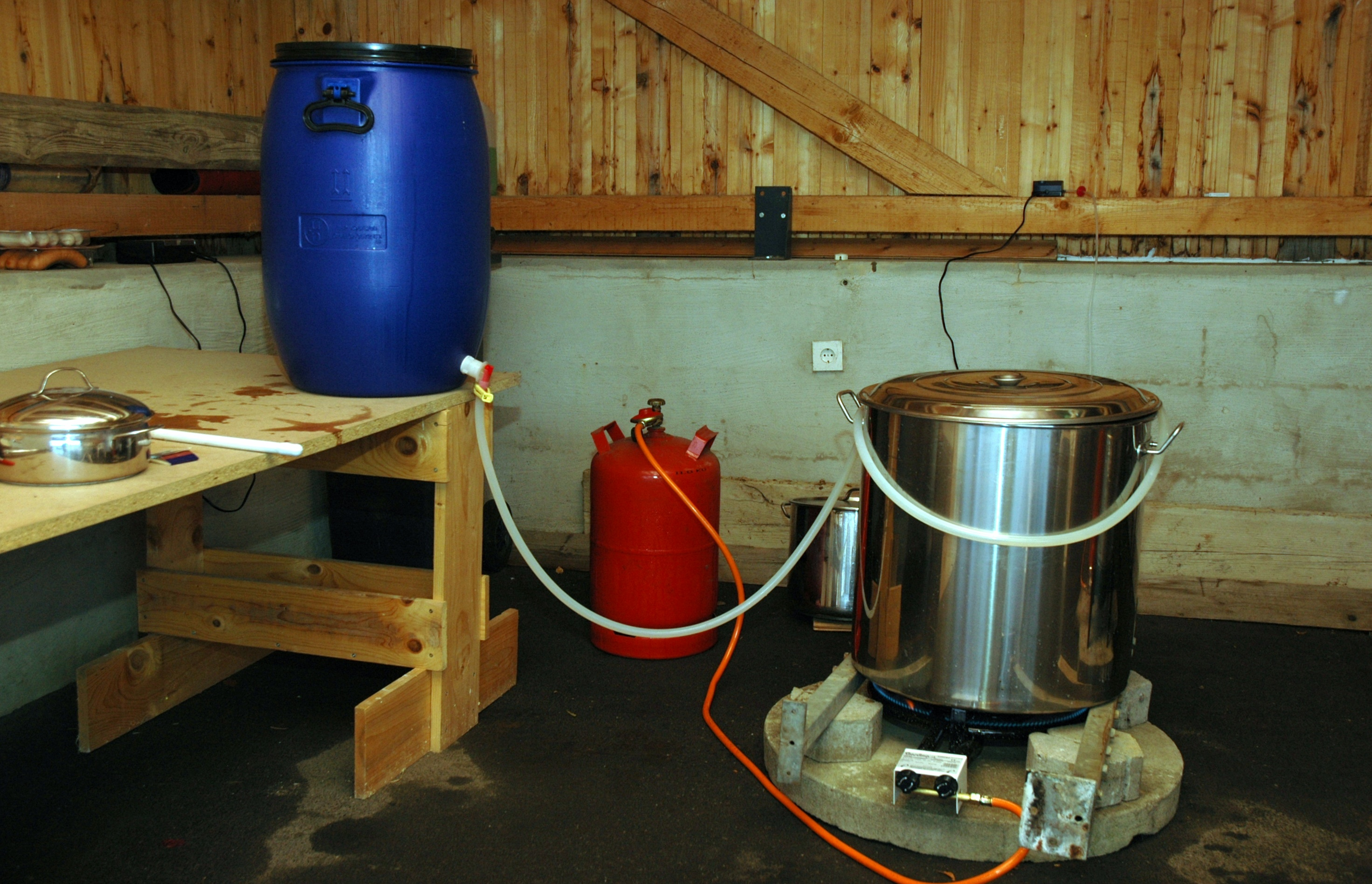 Homebrewery